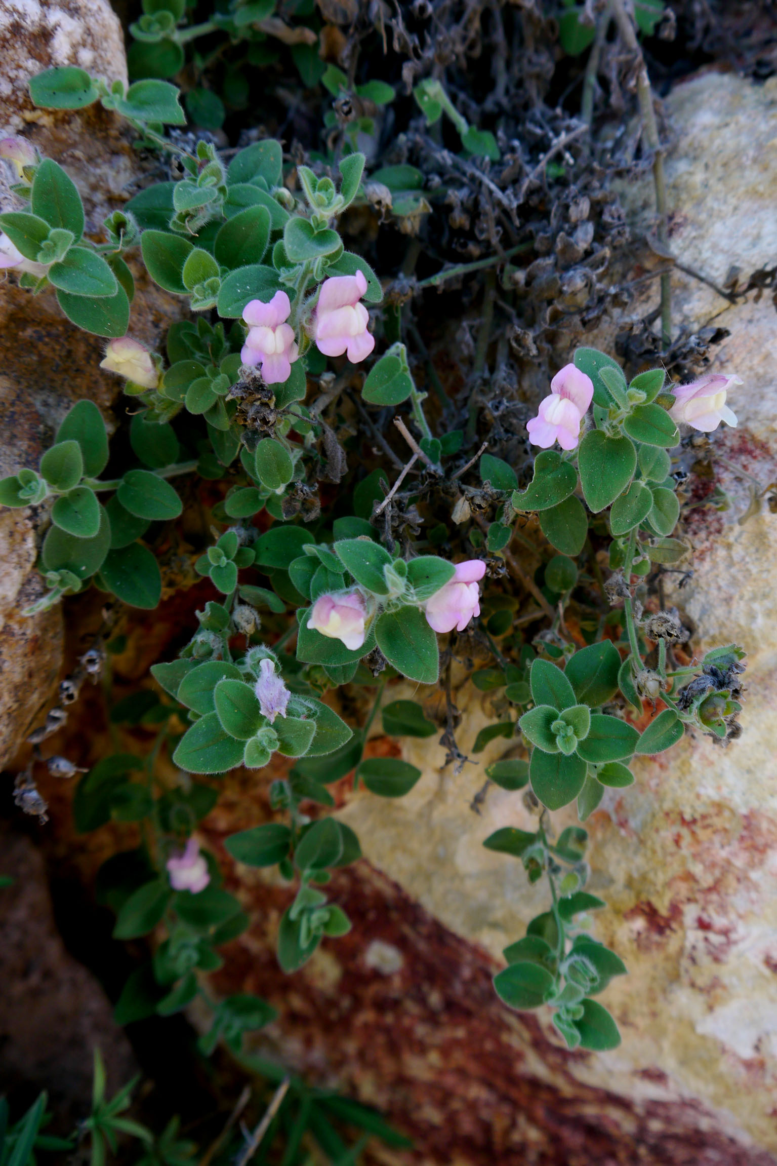 Antirrhinum hispanicum en el Jardín Botánico de Rodalquilar, Almería, España.